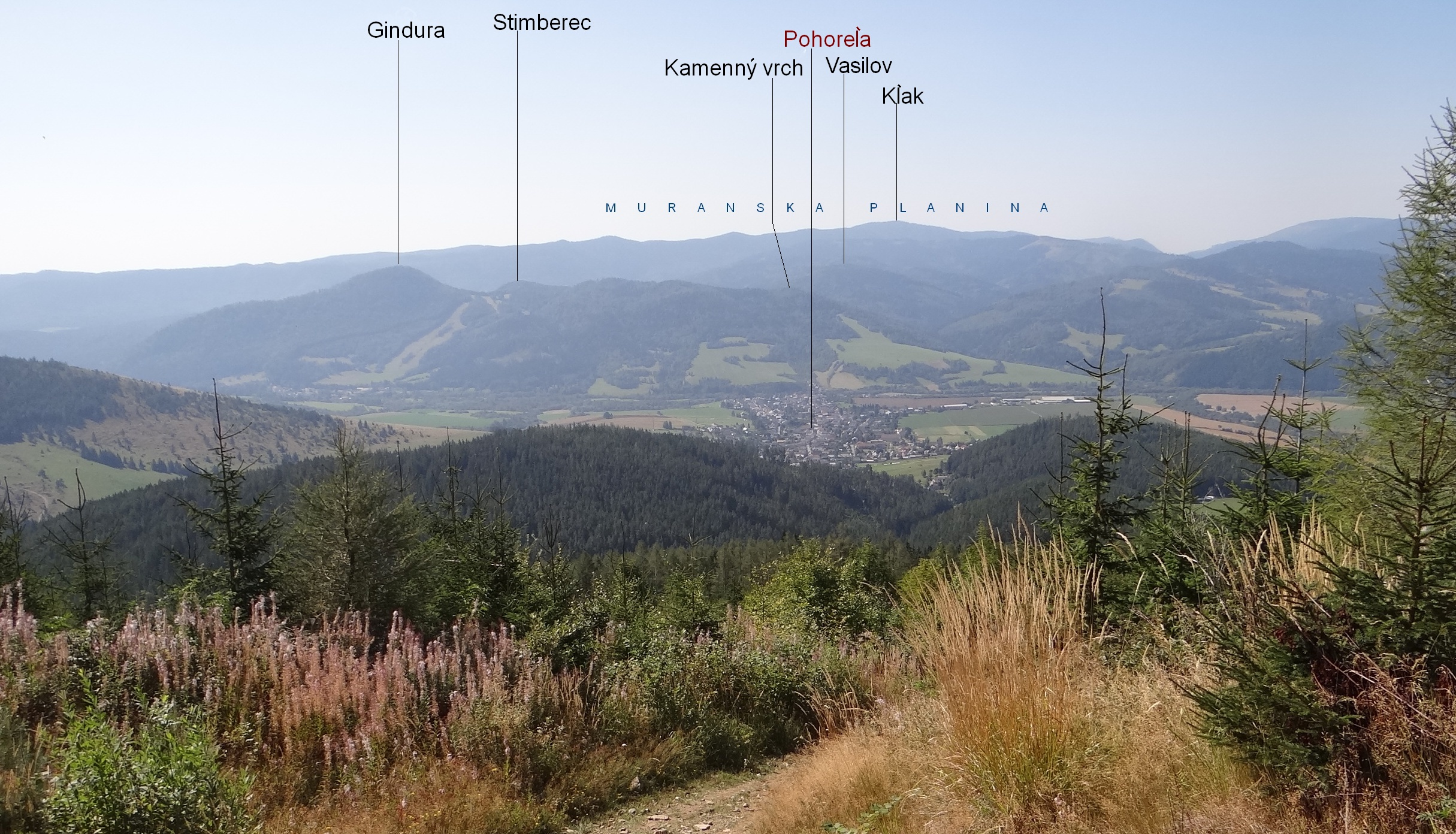 Heľpianske podolie, Muránska planina